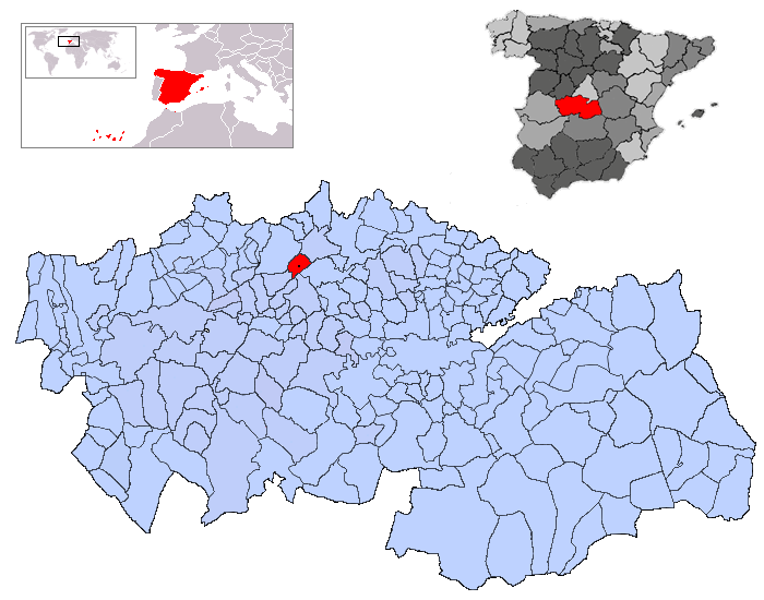 Hormigos en la provincia de Toledo